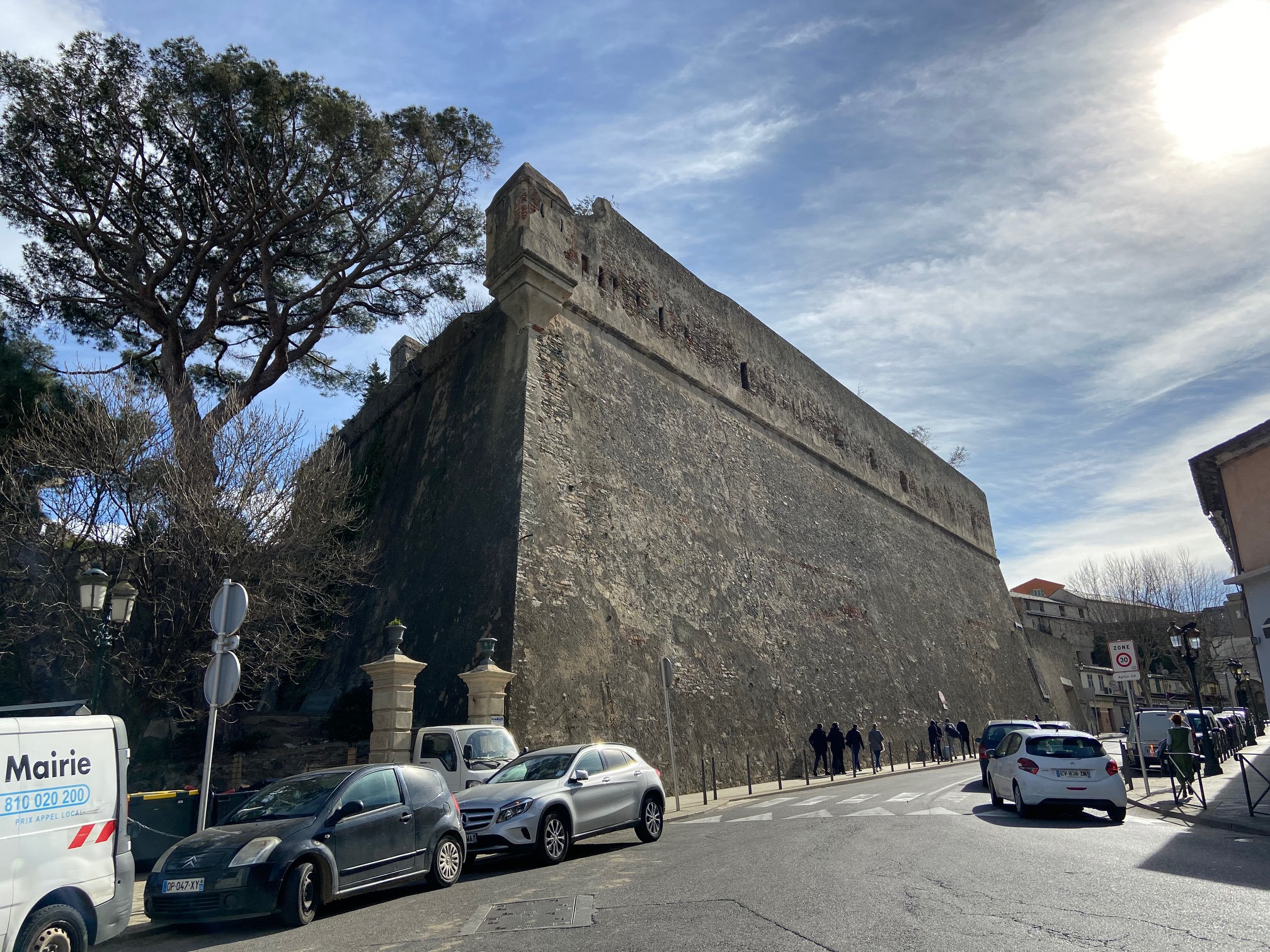 Le bastion San Carlu, à la citadelle de Bastia